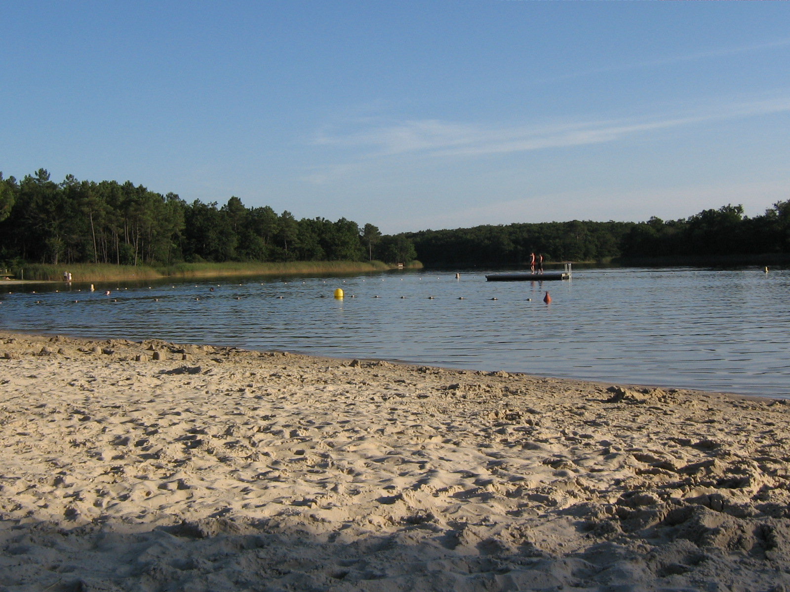 Etang de la Jemaye (forêt de la Double)